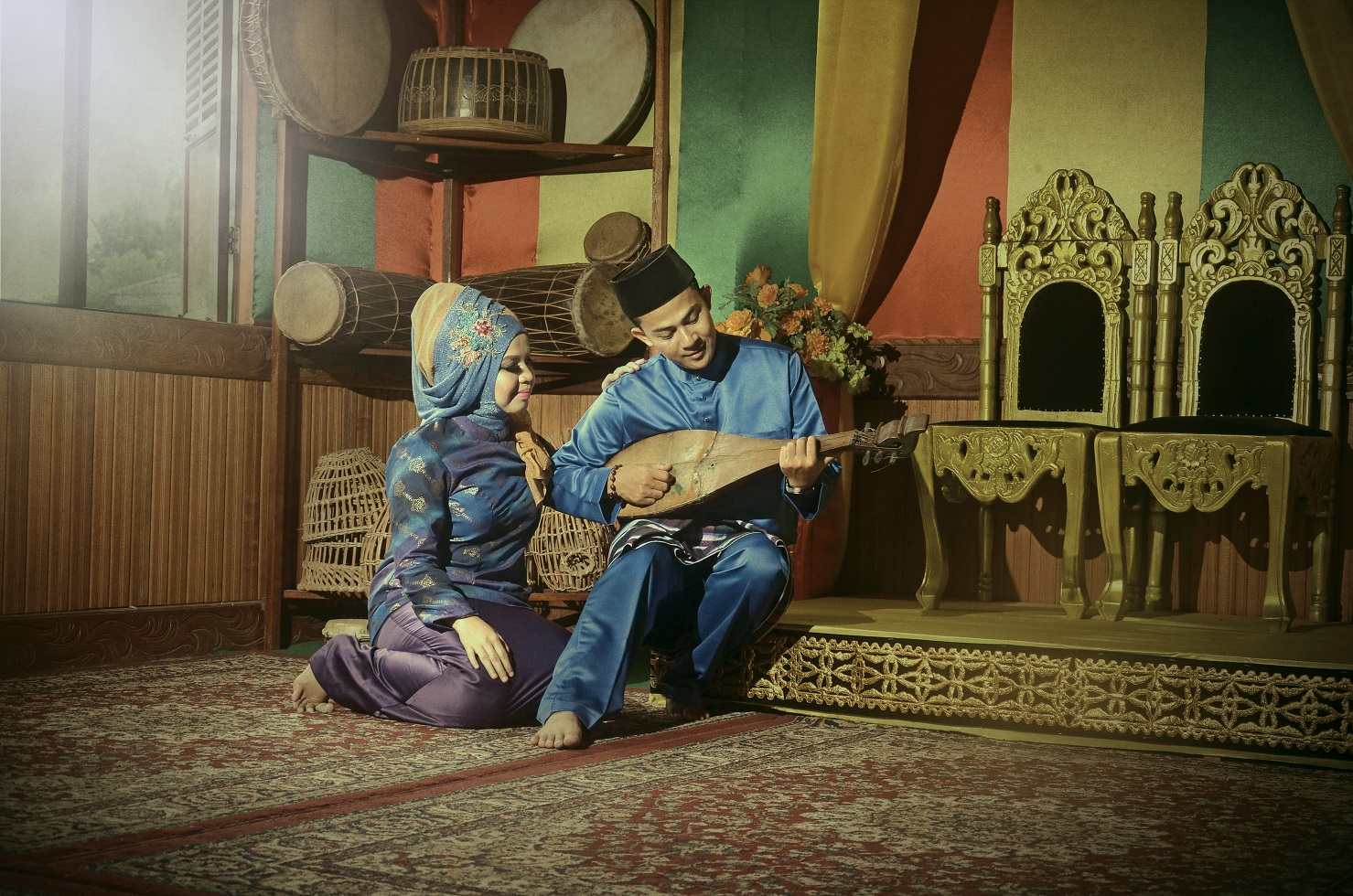 this image about indonesian culture (prewedding photo)